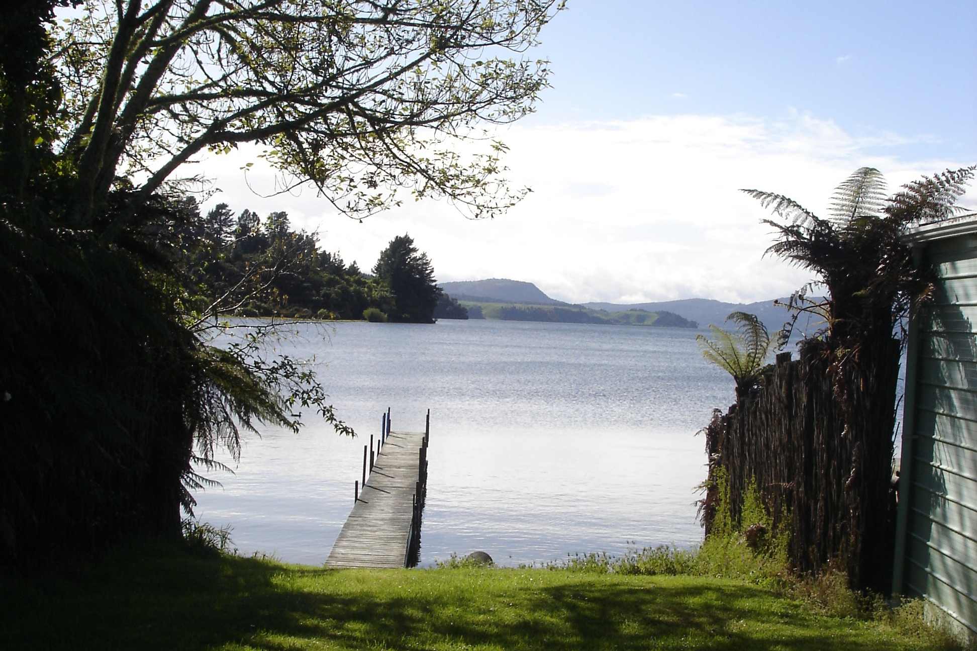 Jetty on Lake Rotoiti